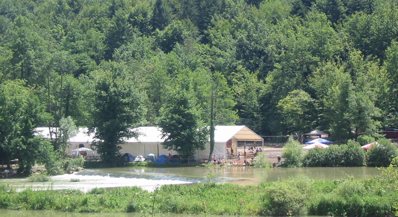 Rock Otočec 2005